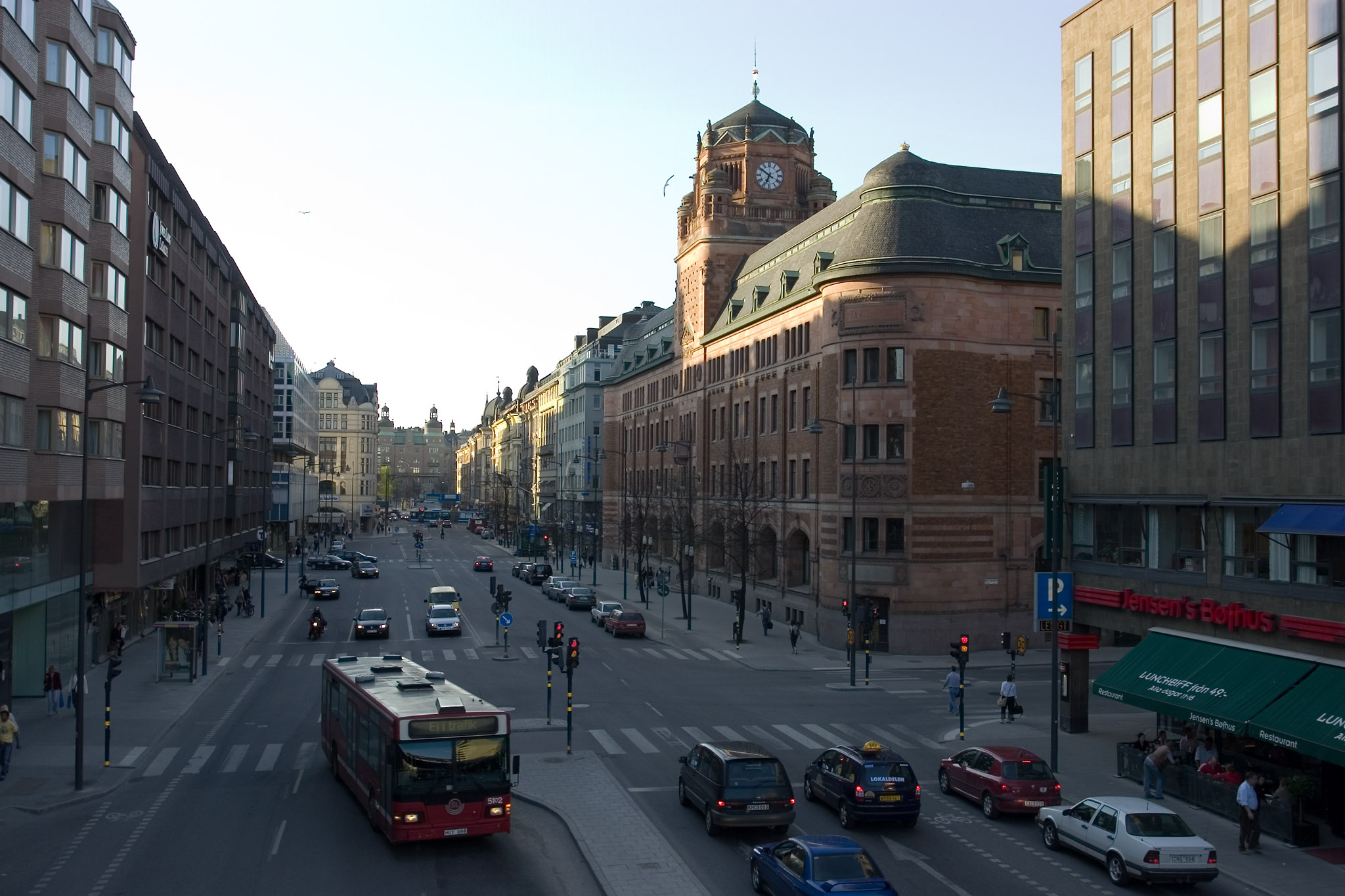 Vasagatan / Stockholm, Sweden